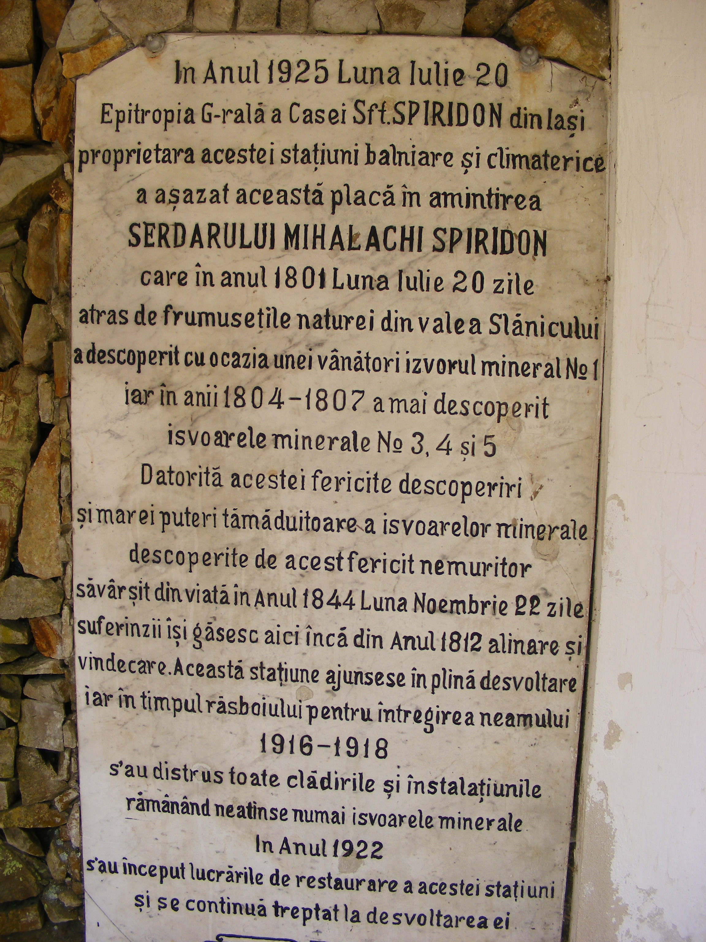 Izvorul 1 - placă memorială